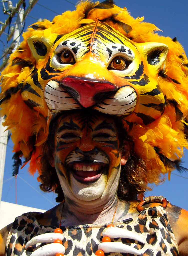 Disfraz de León en el Carnaval de Barranquilla, Colombia.